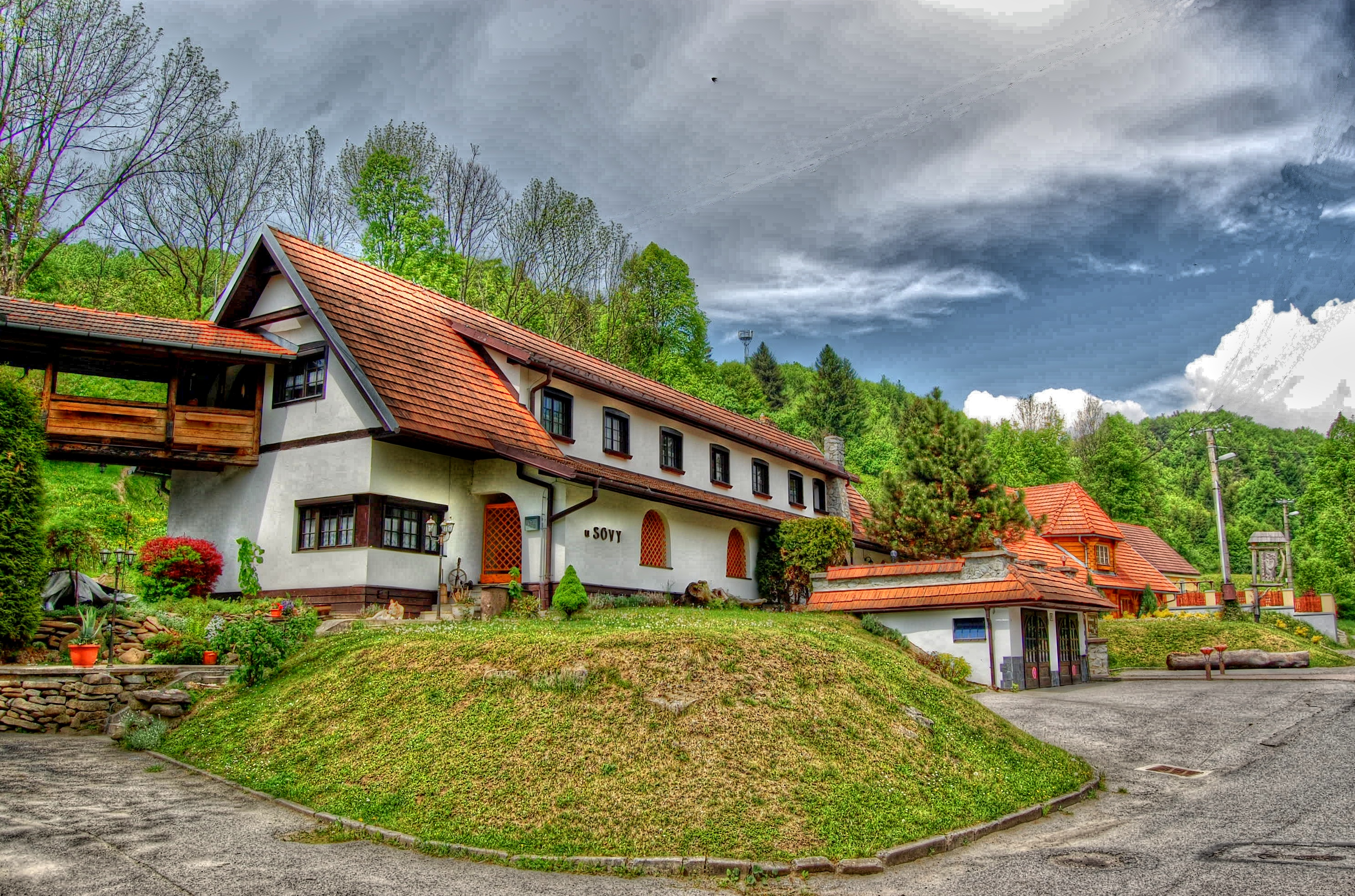 Benova Lehota